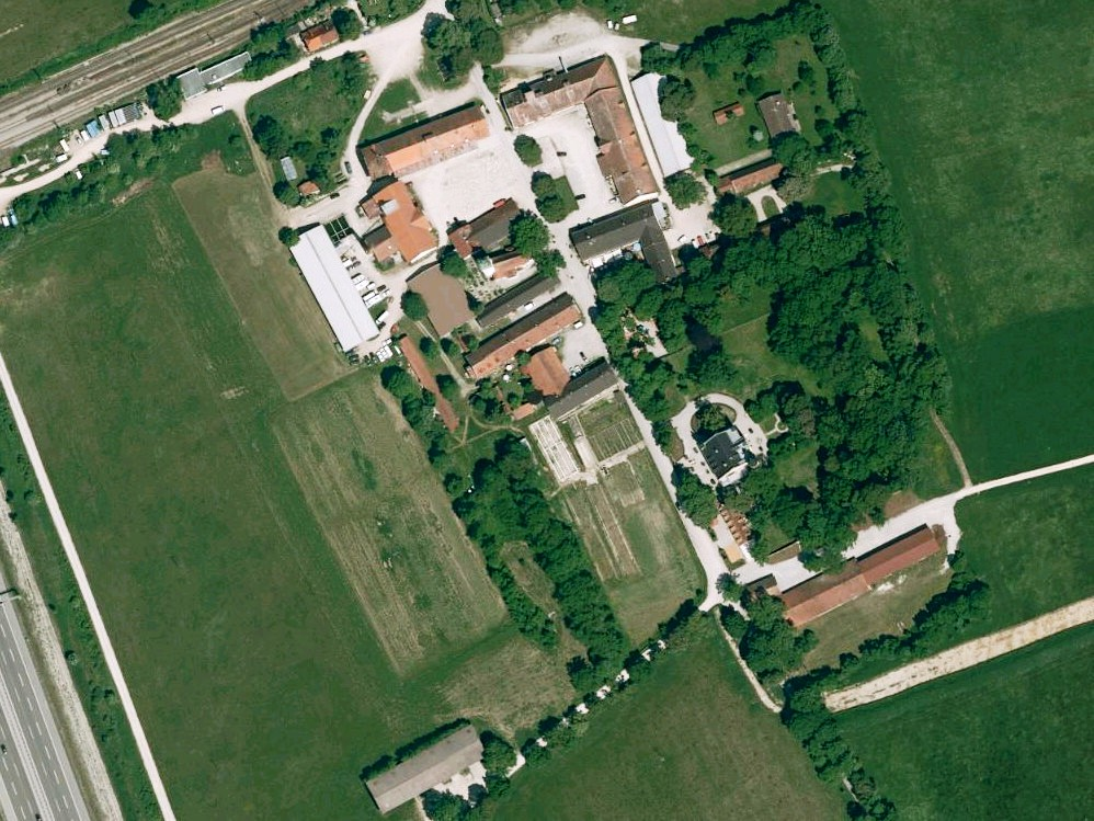 Luftaufnahme der Bayerischen Vermessungsverwaltung: Gut Freiham in München, Bayern.